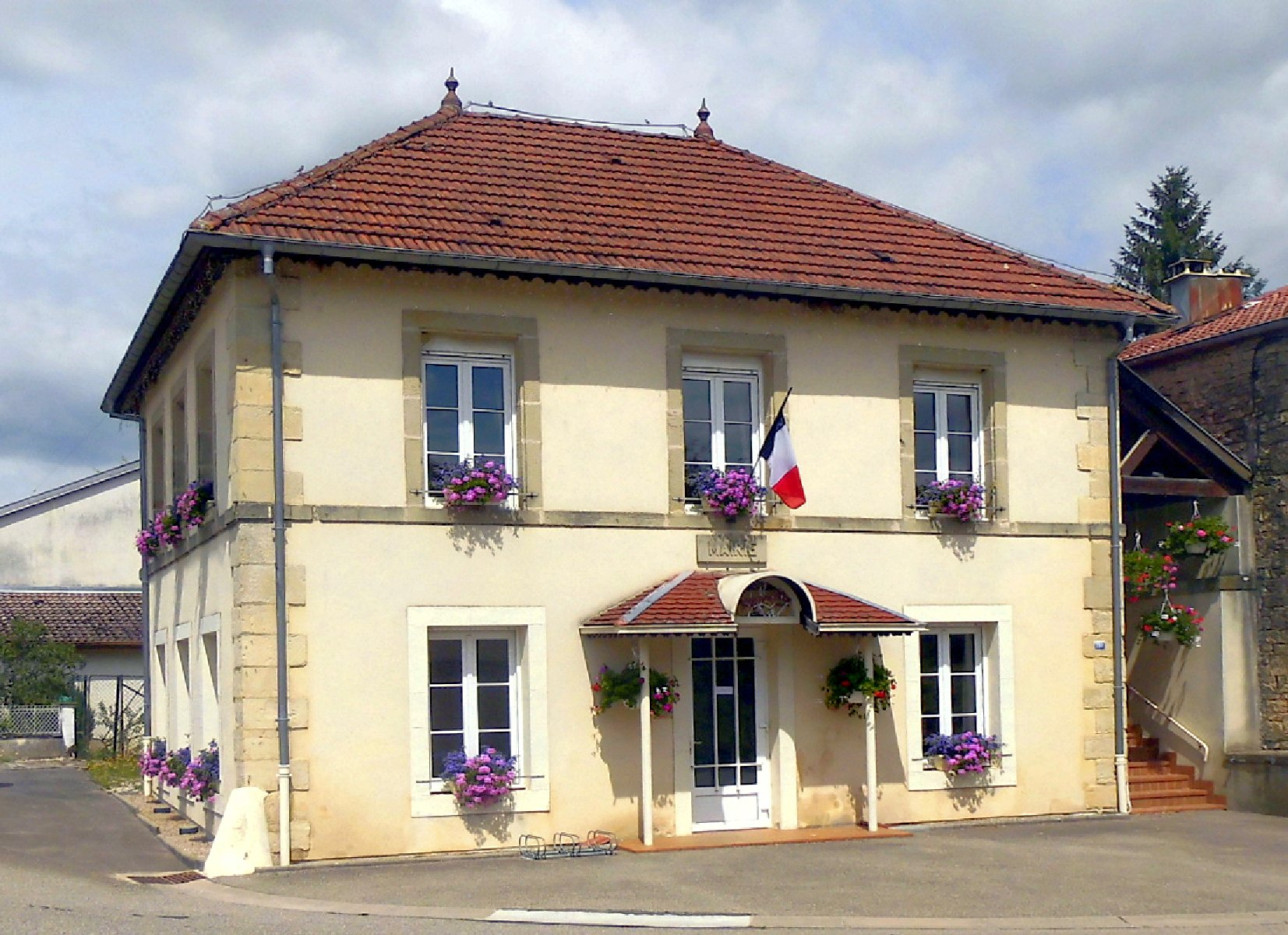 La mairie de Dombrot-sur-Vair